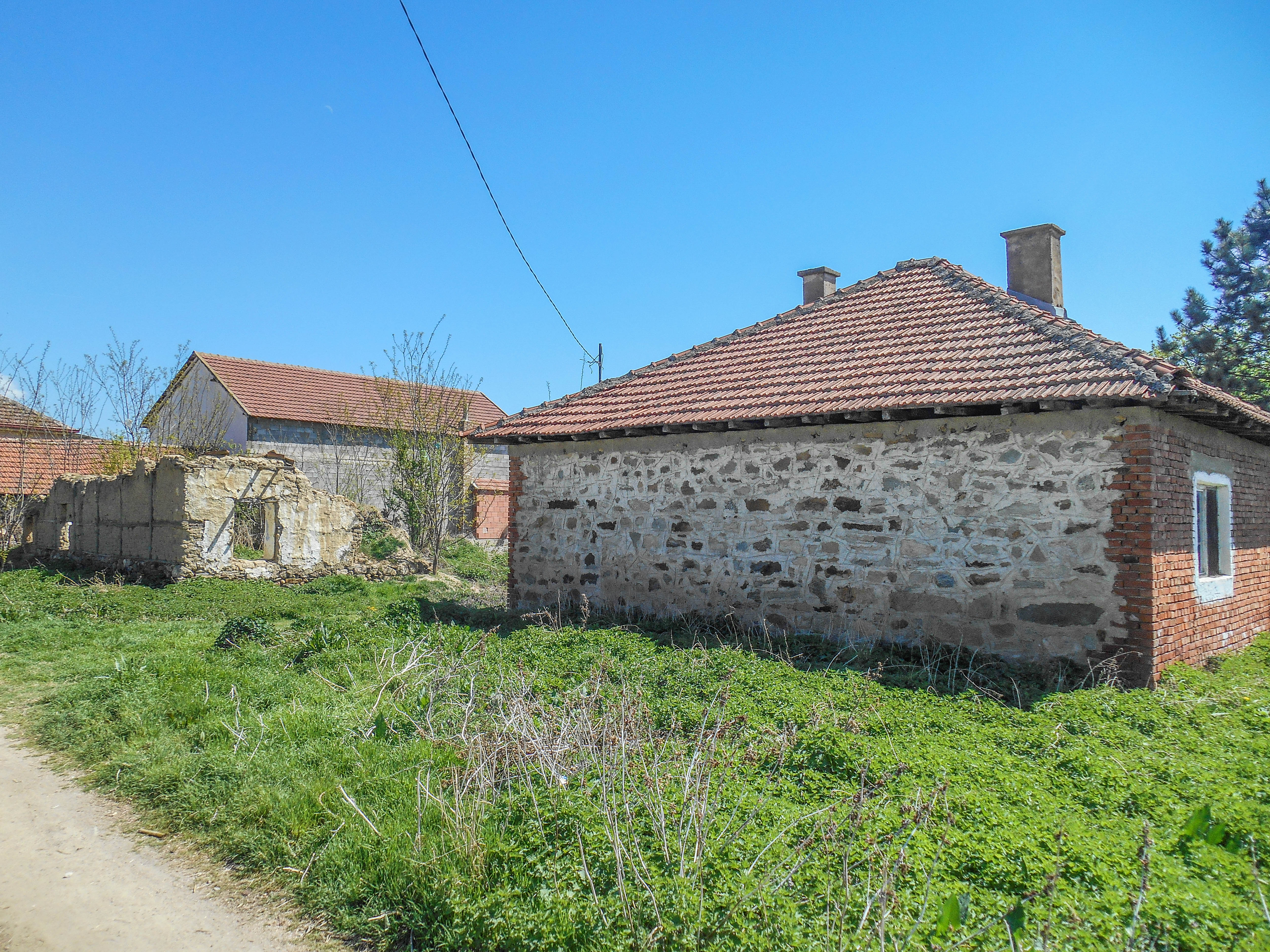 Сарај, Босилово